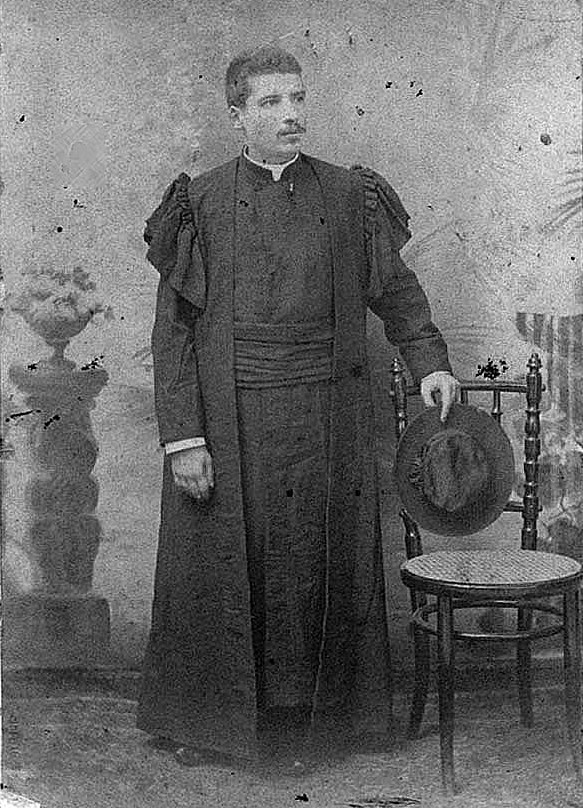 Fotografia tirada em Aden, escala da sua viagem para a India Portuguesa, em Abril de 1890